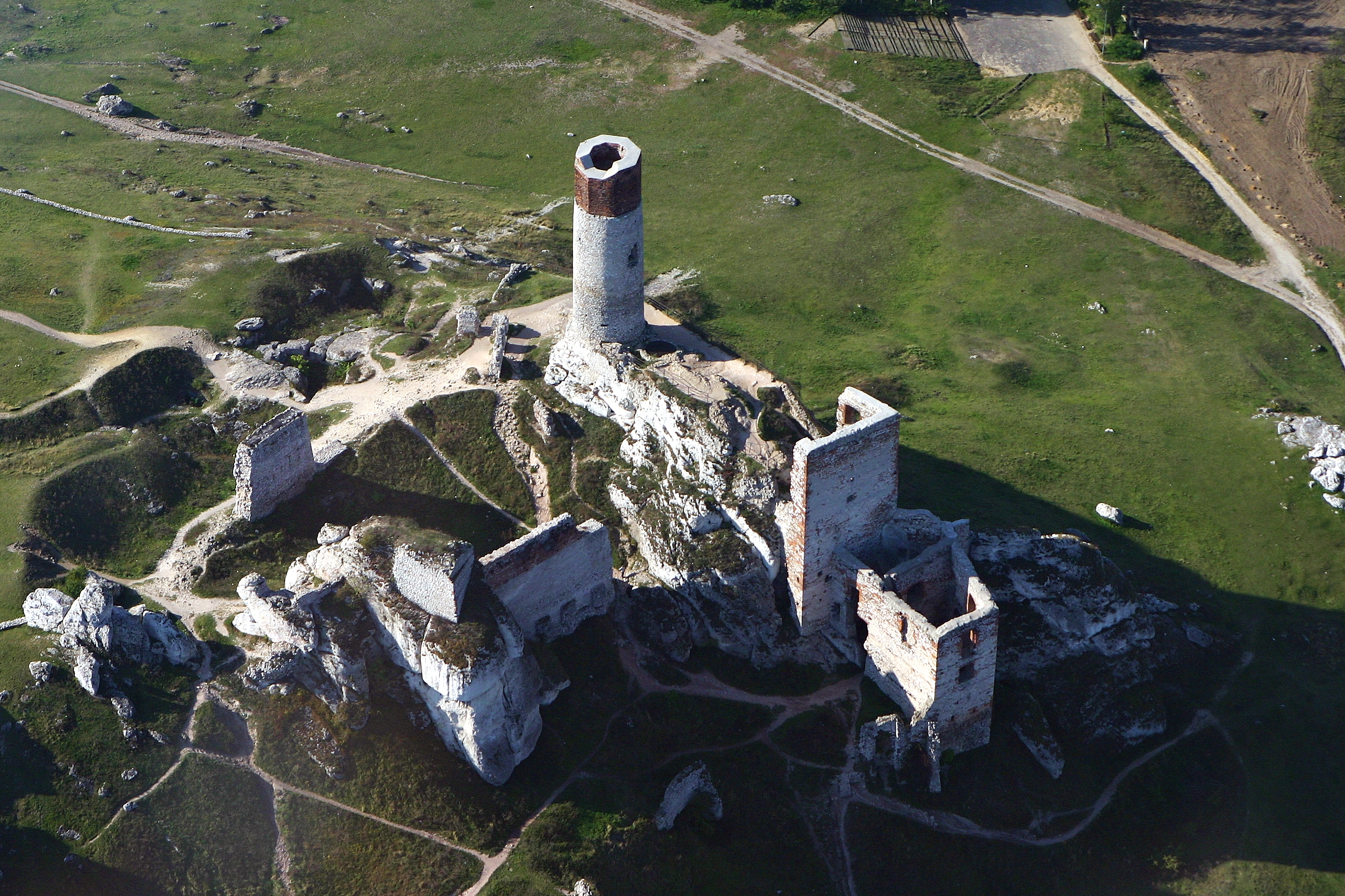 Olsztyn. Ruiny zamku z basztą, XIV, XVI/XVII.